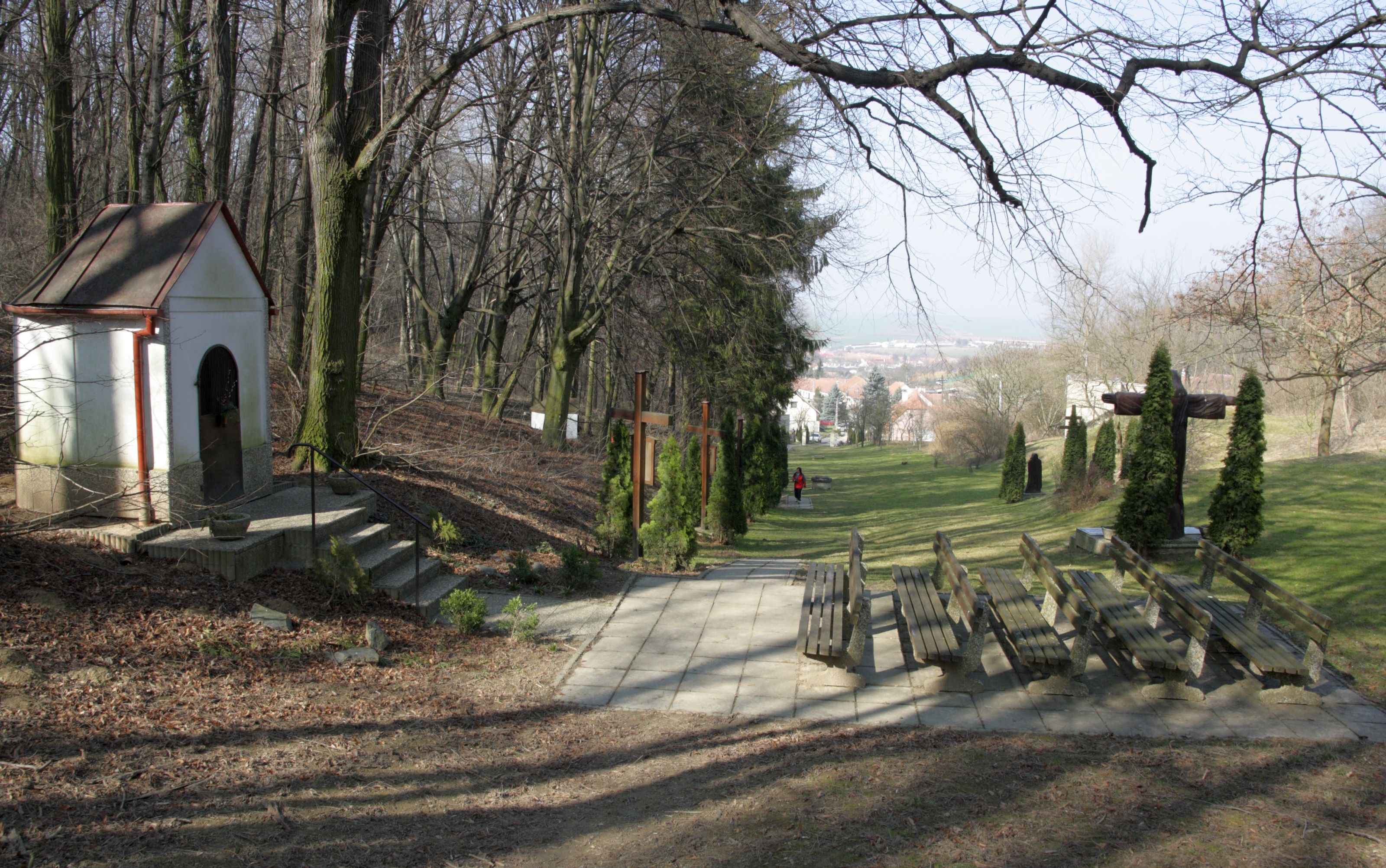 Křepice - U Svaté.